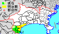 Map of Ashigarashimo District, Kanagawa, Japan